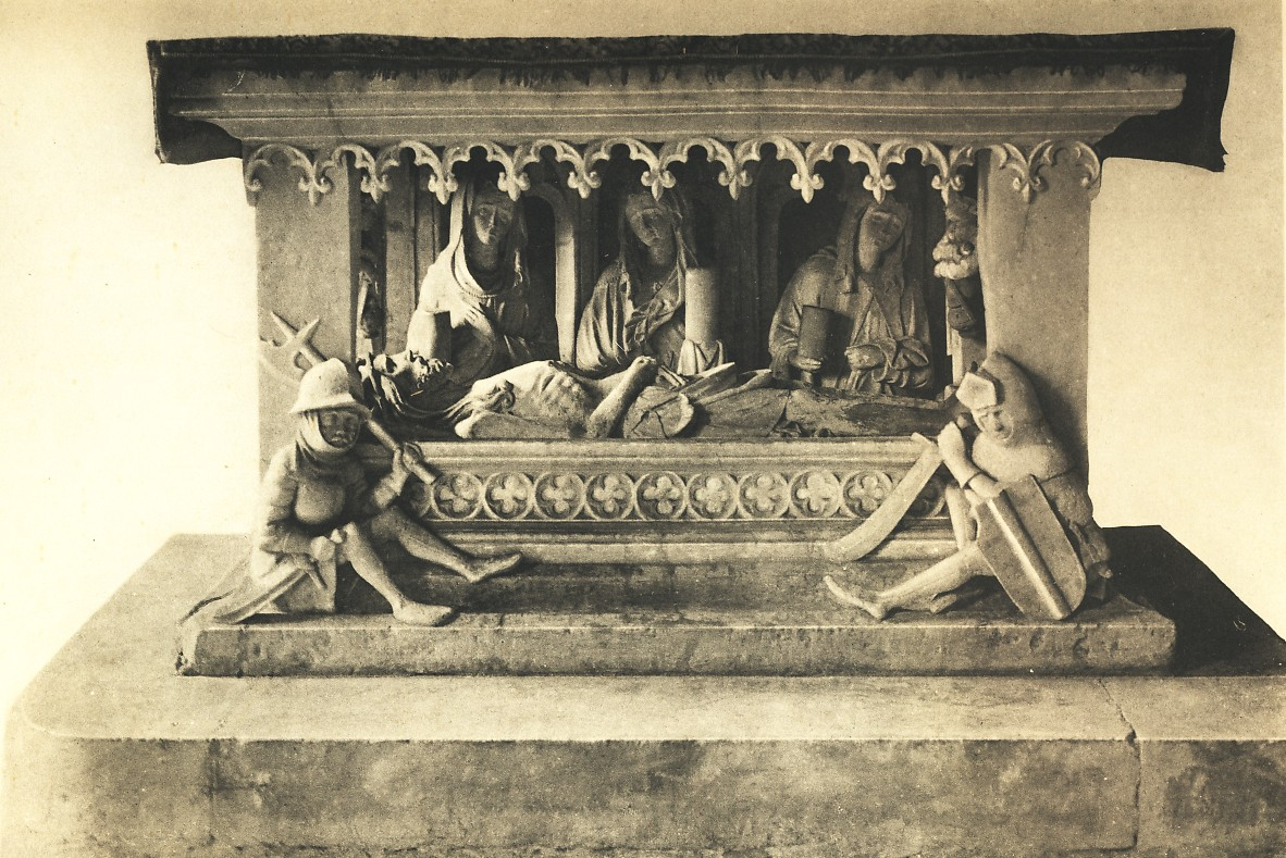 Der Altar mit dem Heiligen Grab aus der Busmannkapelle Dresden, ab dem 16. Jahrhundert in der Bartholomäus-Kirche Dresden